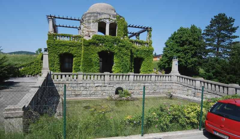 Vorderseite des Trinkwasserbehälters Hackenberg in Wien-Döbling